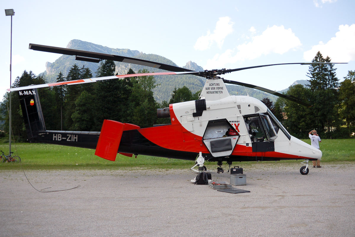 K-Max der Firma Rotex in St.Martin/Lofer, Austria